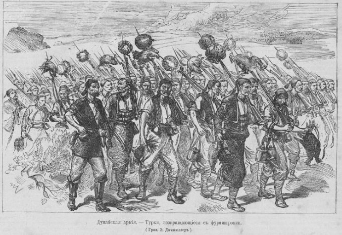 Турски войски събират хранителни припаси от местното население през Руско турската война 1877-1878г.